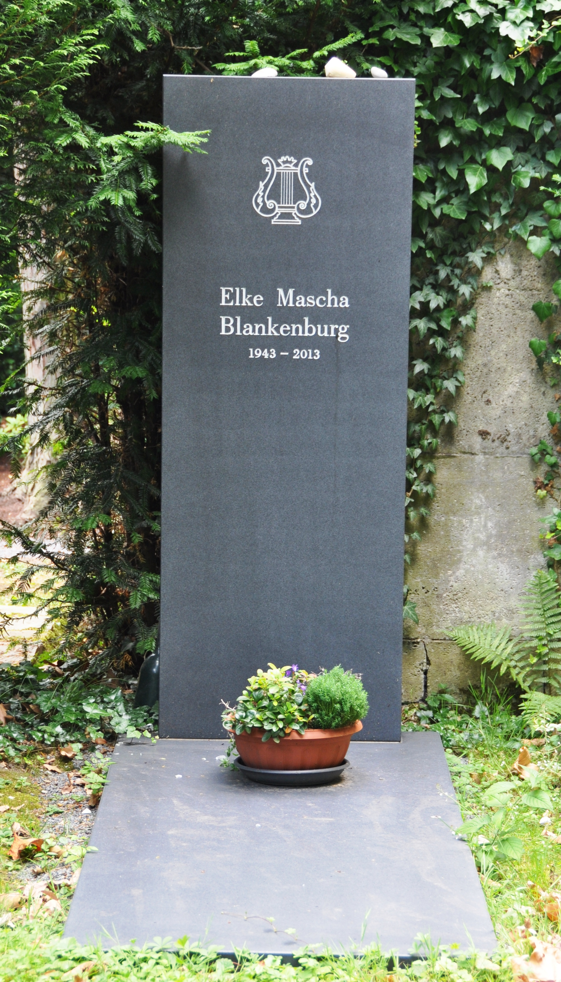 Grabstein für Elke Mascha Blankenburg auf dem Melaten-Friedhof in Köln